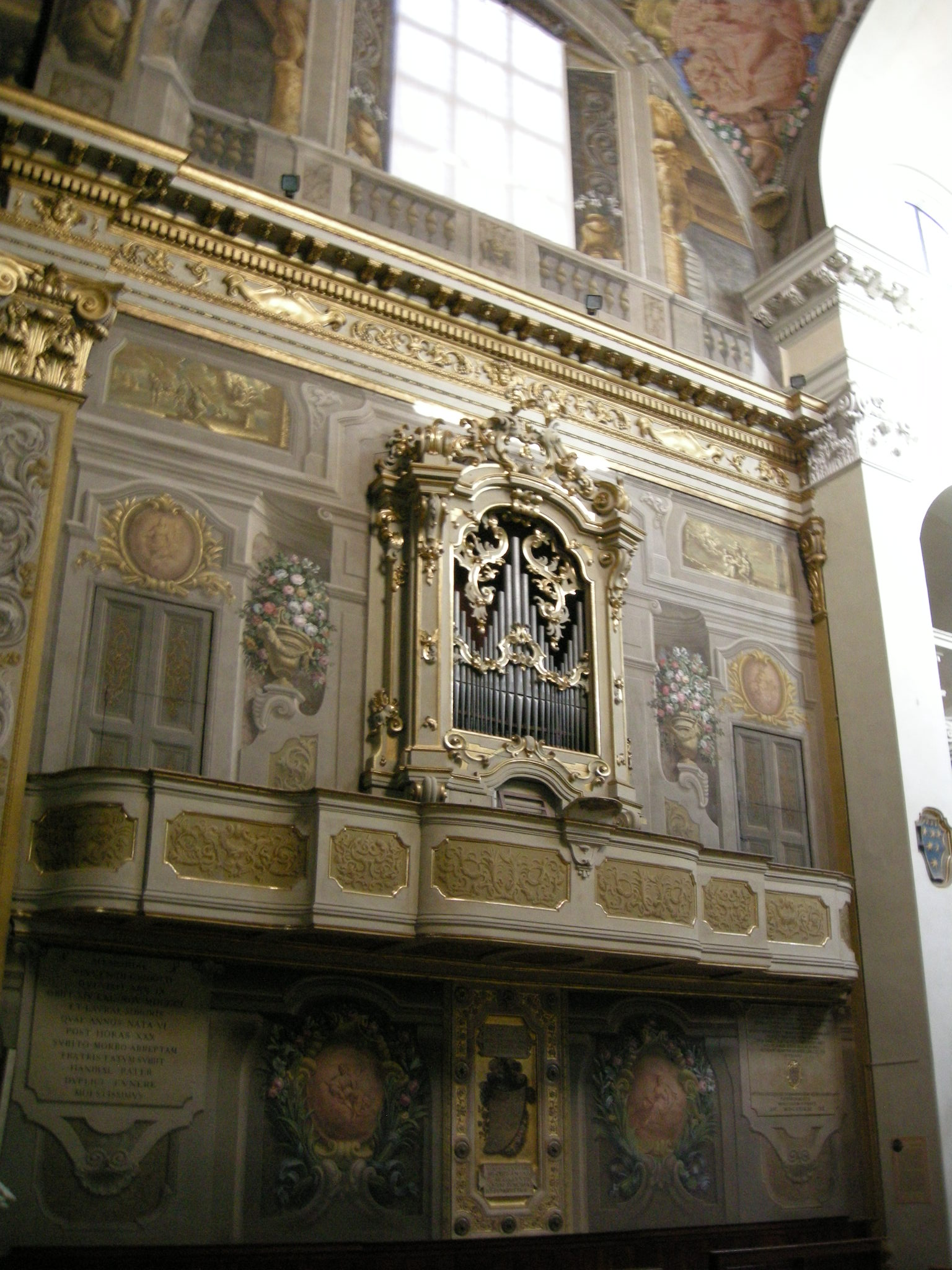 San domenico, bologna, cappella del Rosario